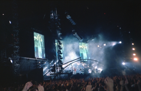 Genesis in corcerto. Nizza - Luglio 1992